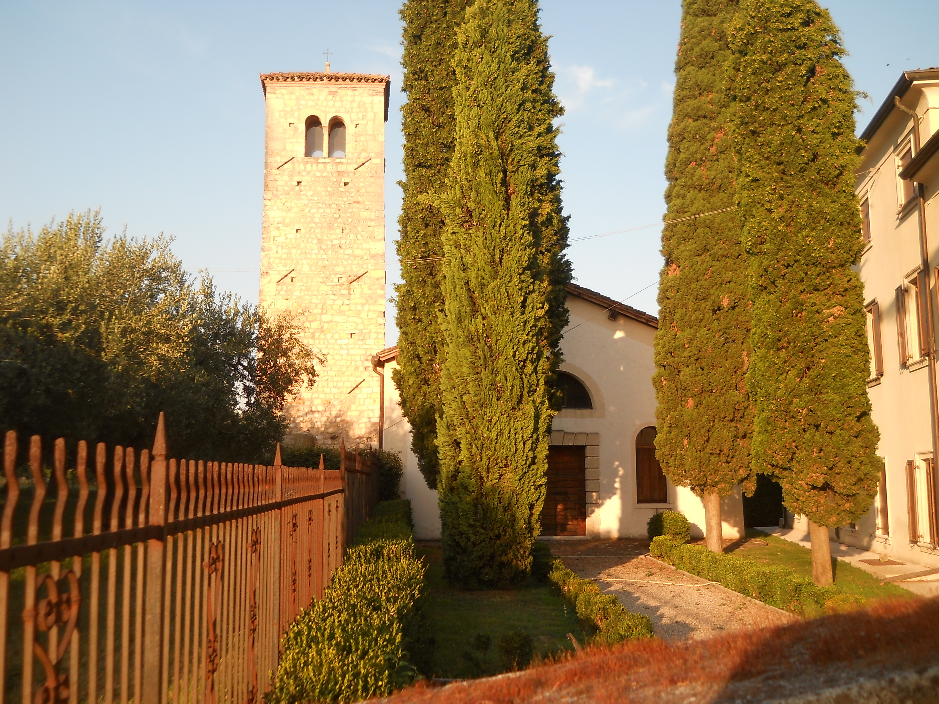 Chiesa con campanile romanico (XI secolo) a Illasi (provincia di Verona)